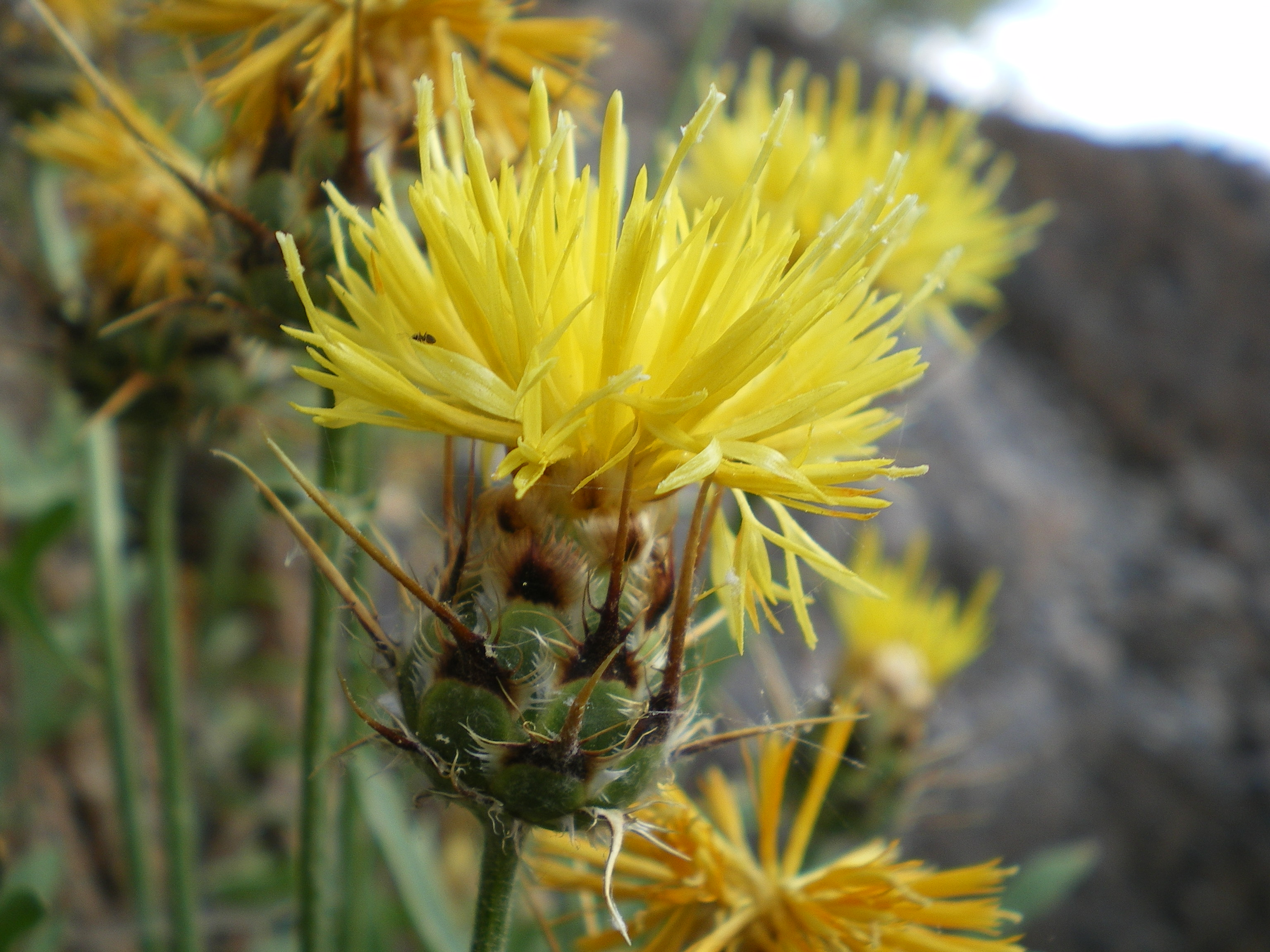 Fotografía lateral de inflorescencia y capítulo de Centaurea kunkelii, tomada en Sierra de Gádor, Almería, España.